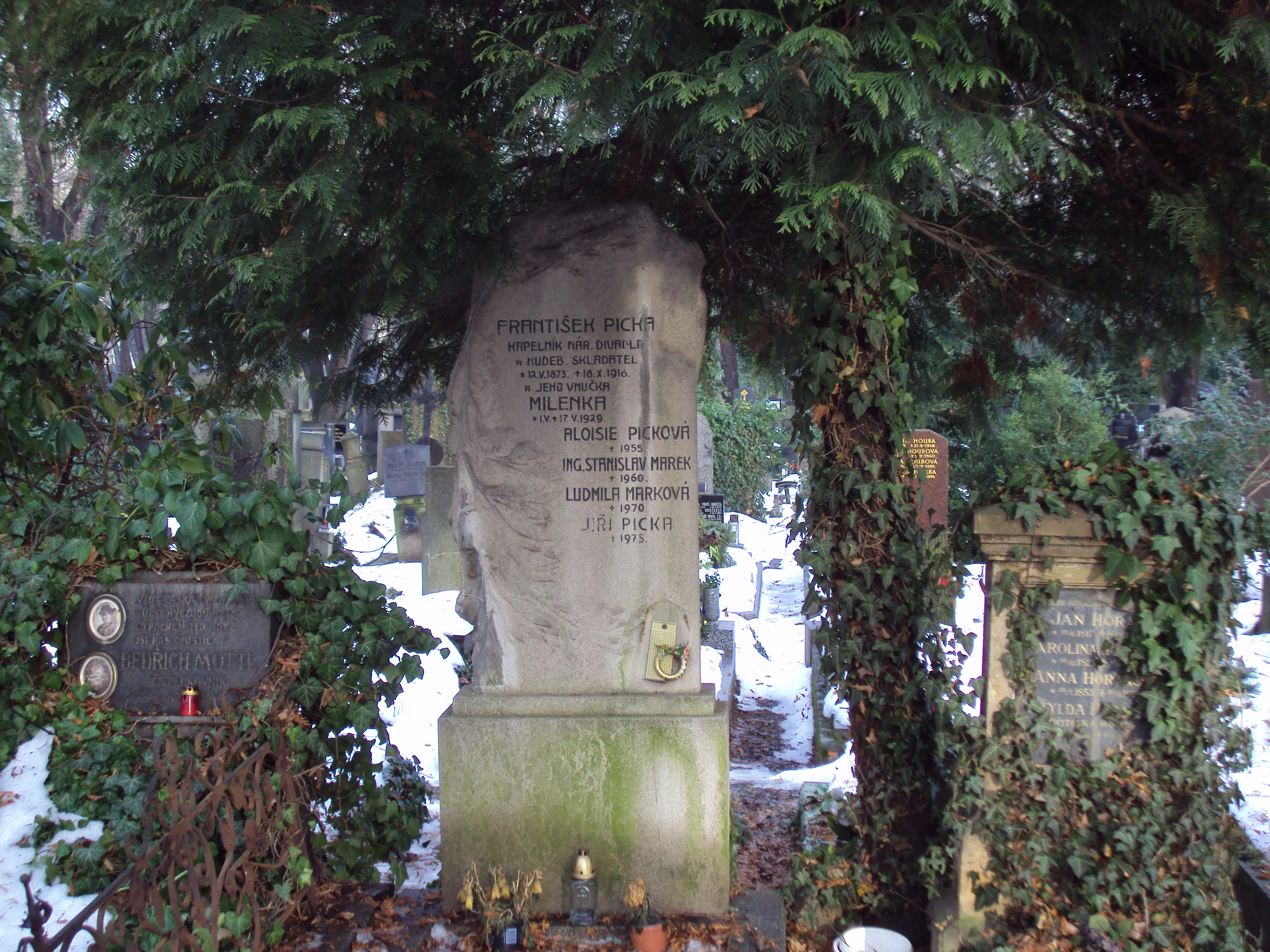 Hrob hudebního skladatele F.Picky na Olšanském hřbitově